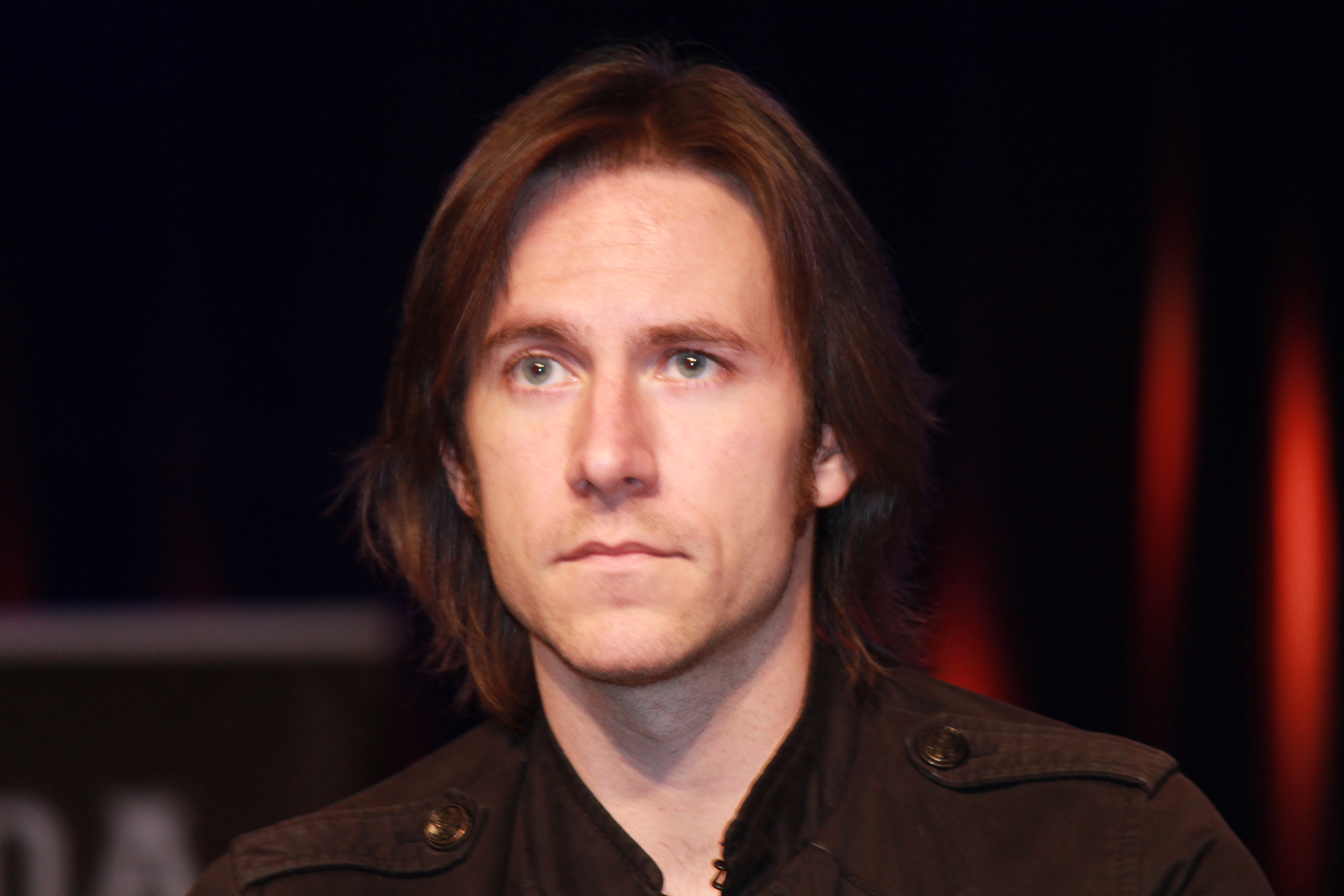 AM 11 15 sat c3_0184